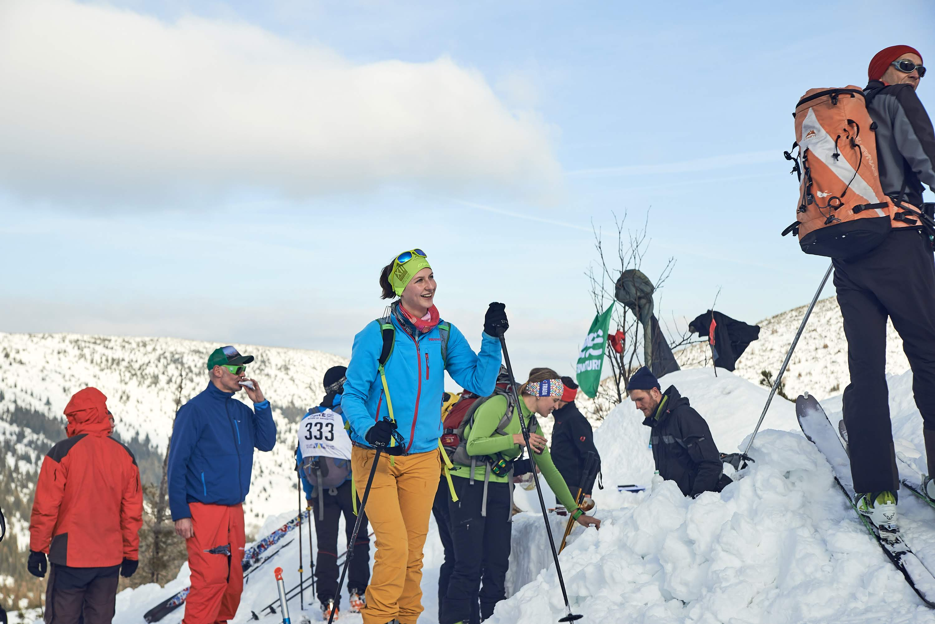 Спортсмени на відпочинку. Кубок Білого Слона 2018